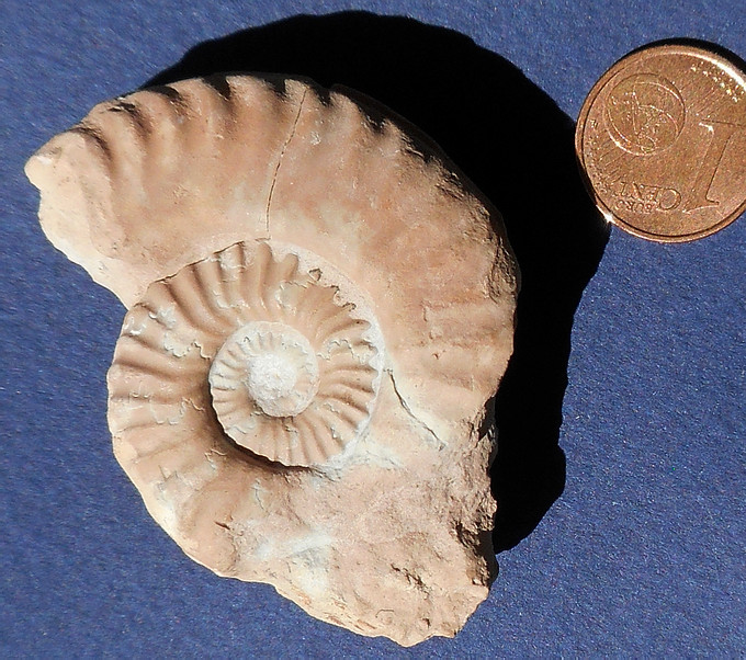 Mercaticeras rosa M. Martani